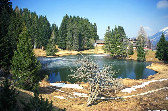 Les Paccots: Lac des Joncs (Binsen-Weiher)